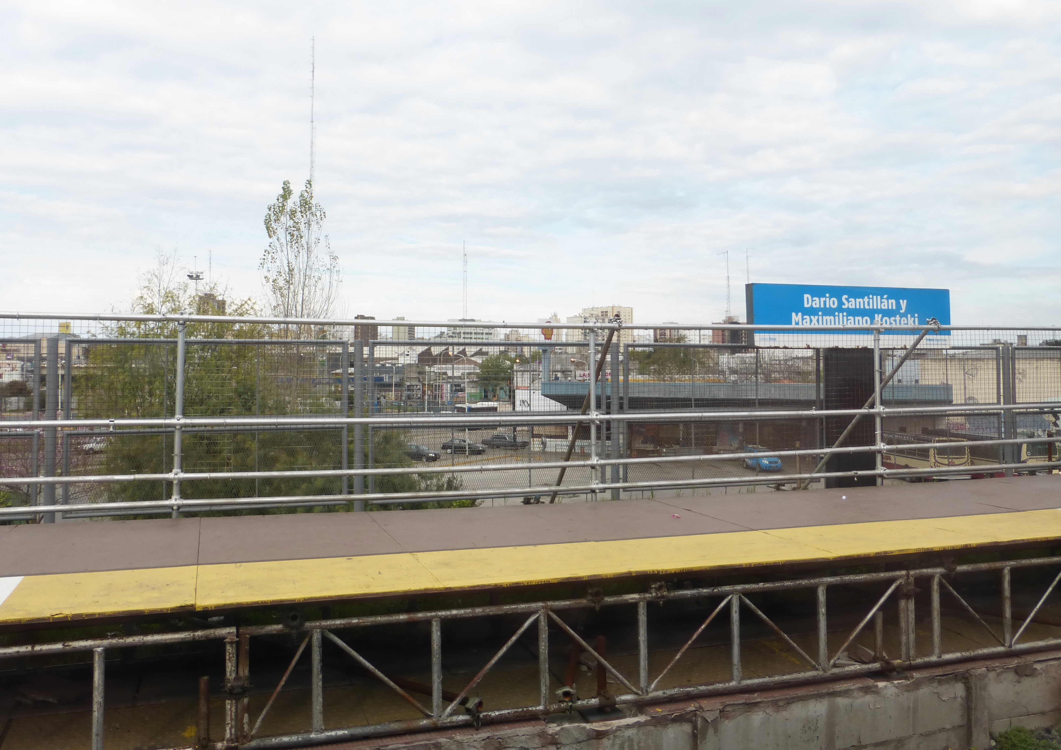 Estación Avellaneda con la nueva nomenclatura "Darío Santillán y Maximiliano Kosteki".